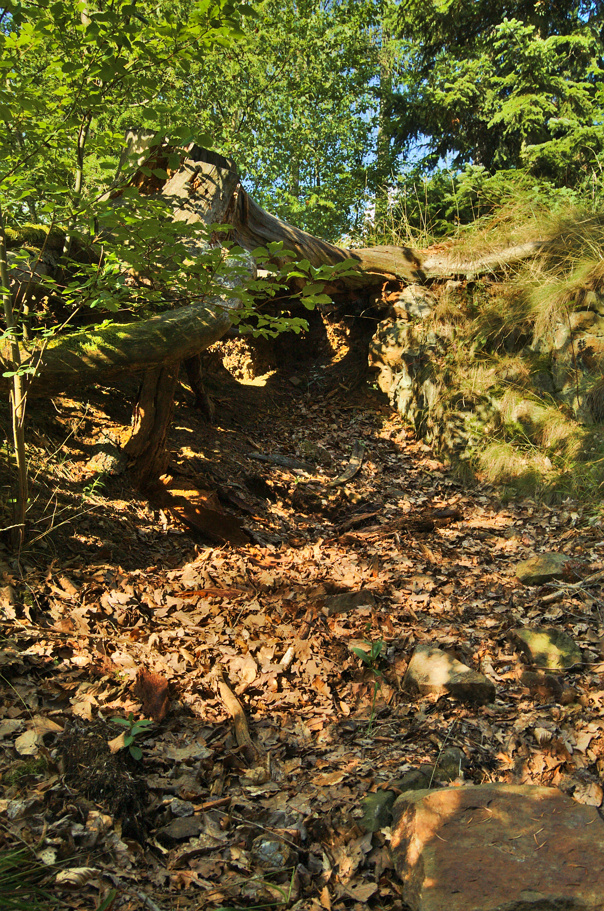 Jáma v zemi na místě Čertova hrádku, Okluky, Malé Hradisko, okres Prostějov